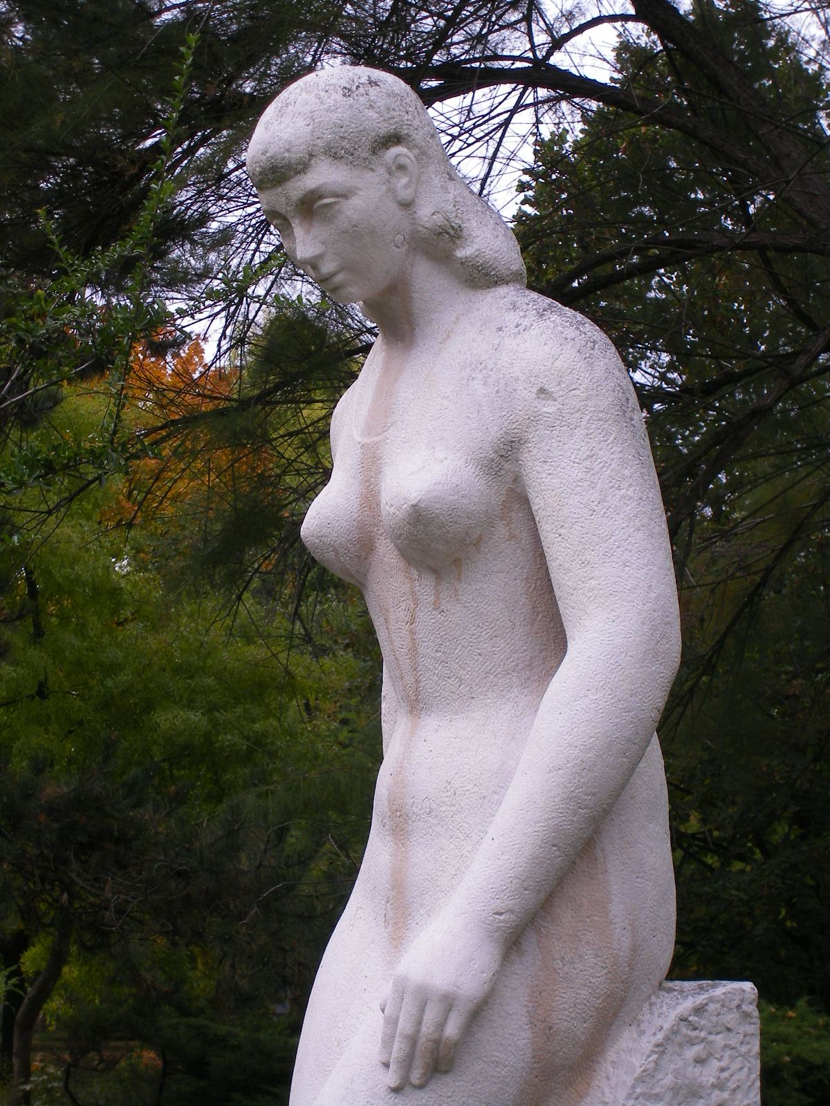 Almásfüzitő - Balázs István (1908-1995) alkotása: Álló nő fürdés előtt